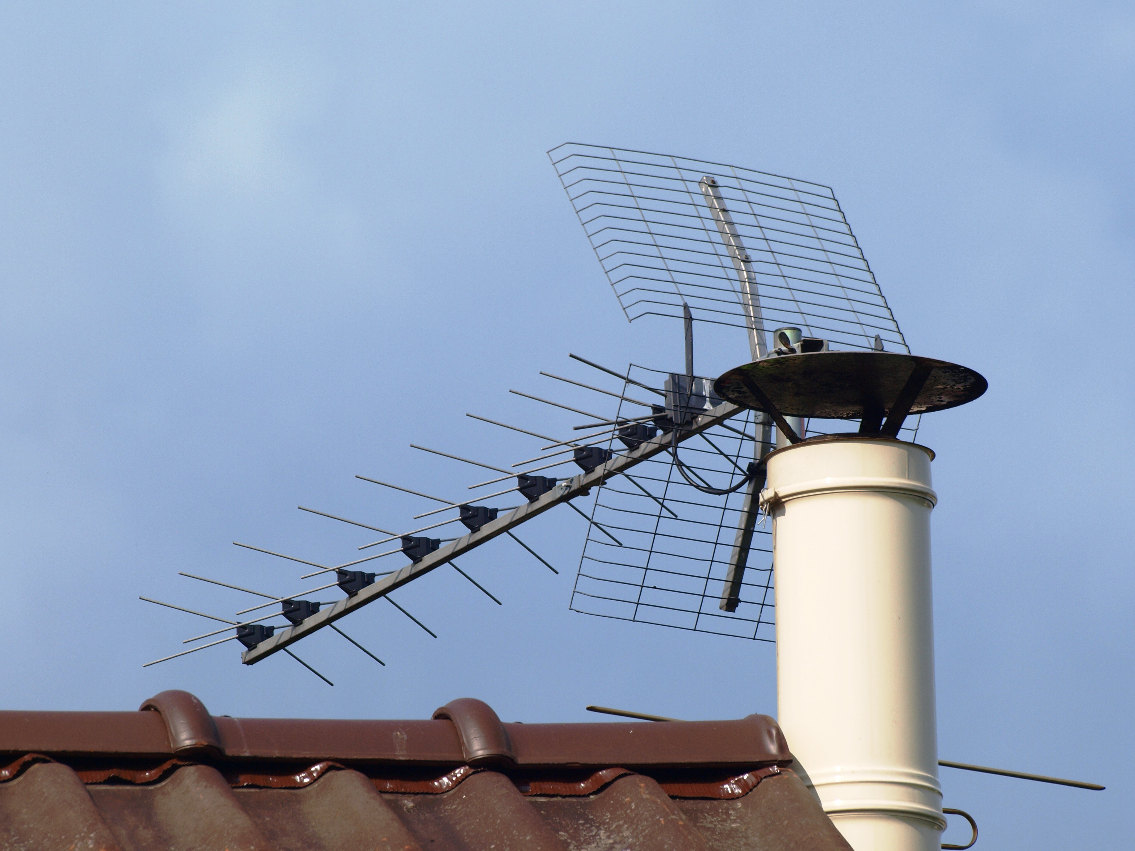 Antenne yagi, sur un toit, à Cély-en-Bière (Seine-et-Marne, France)